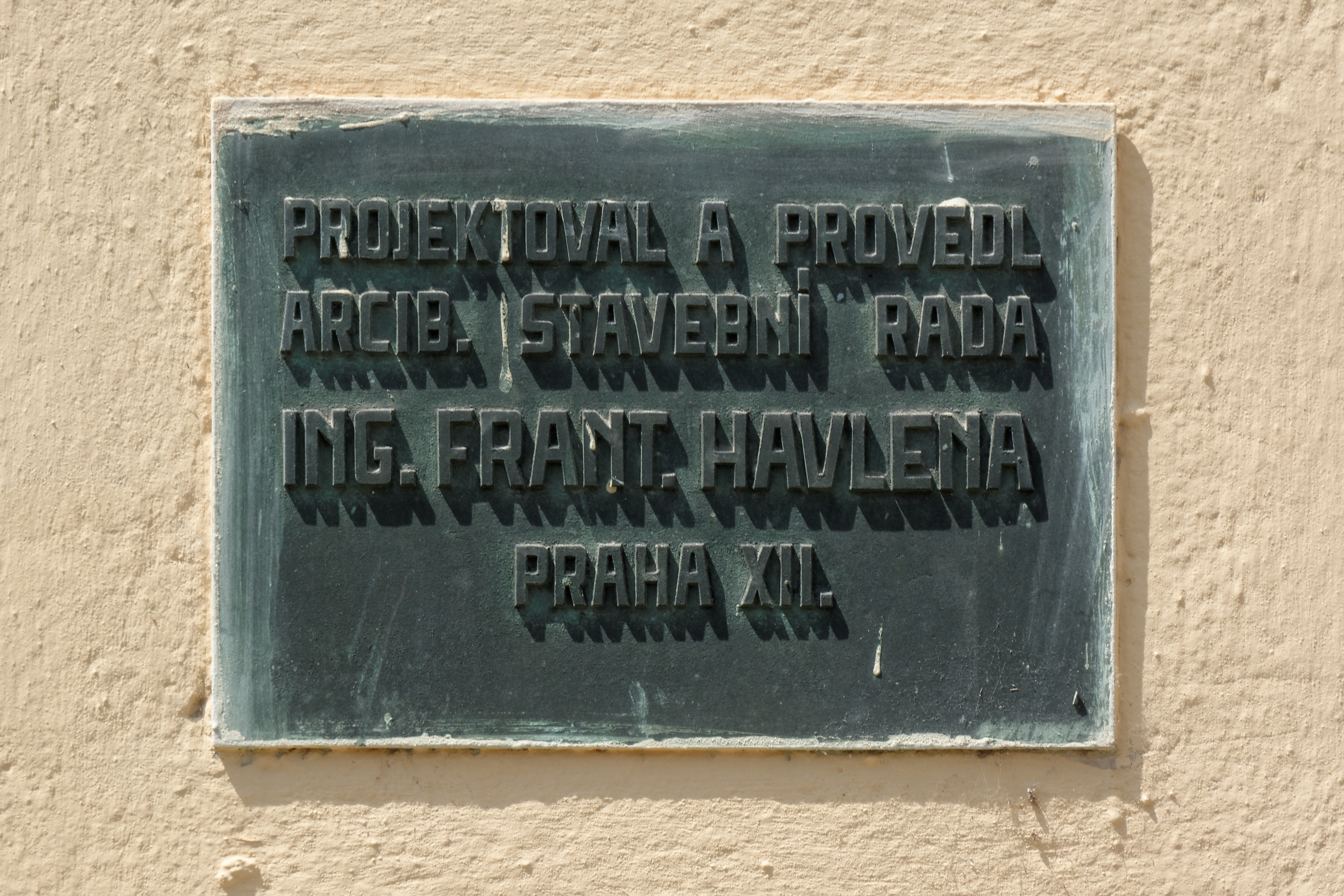 Deska s textem: PROJEKTOVAL A PROVEDL ARCIB. STAVEBNÍ RADA ING. FRANTIŠEK HAVLENA PRAHA XII. Arcibiskupský seminář, Praha 6 - Dejvice, Thákurova 676/3